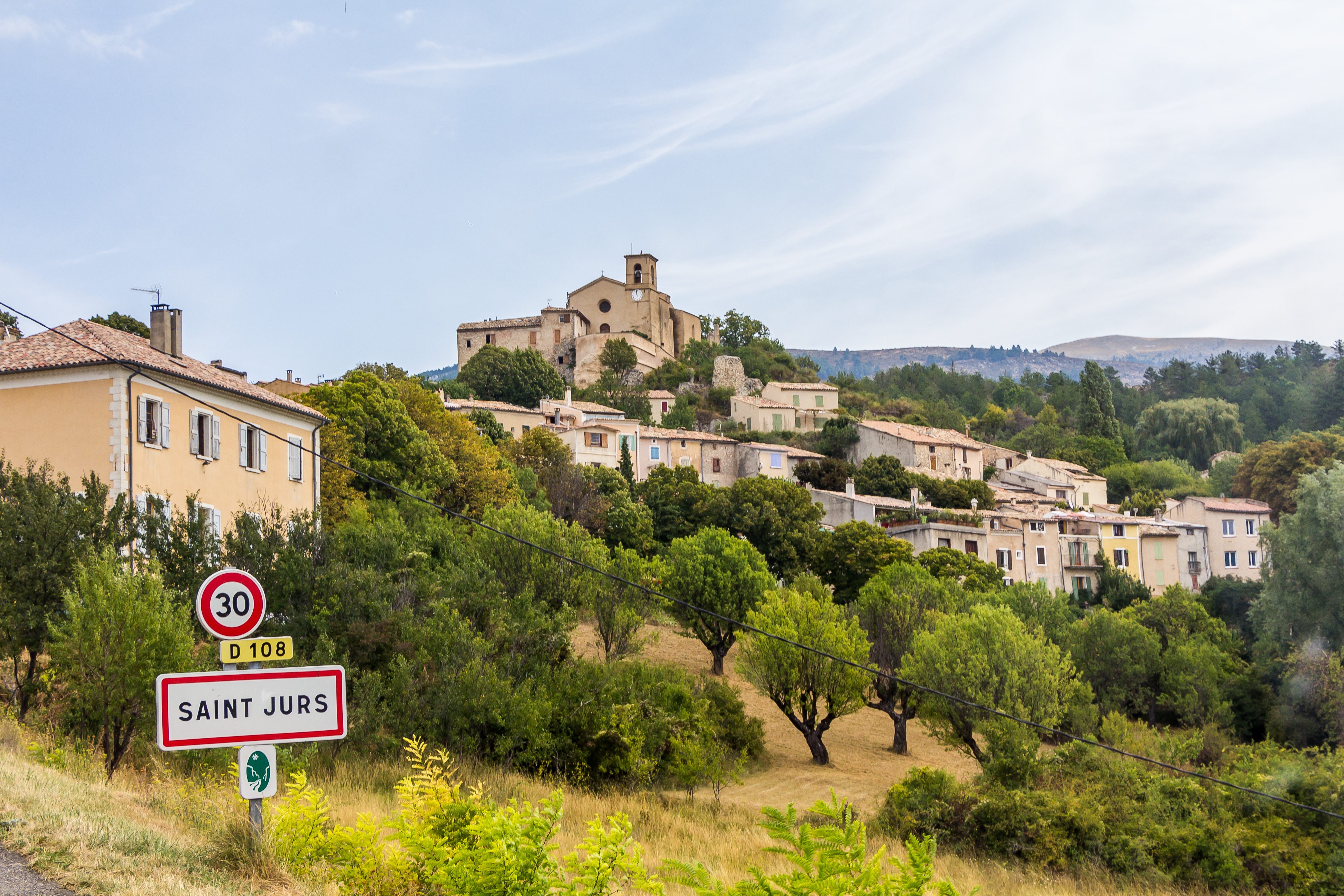 Saint-Jurs